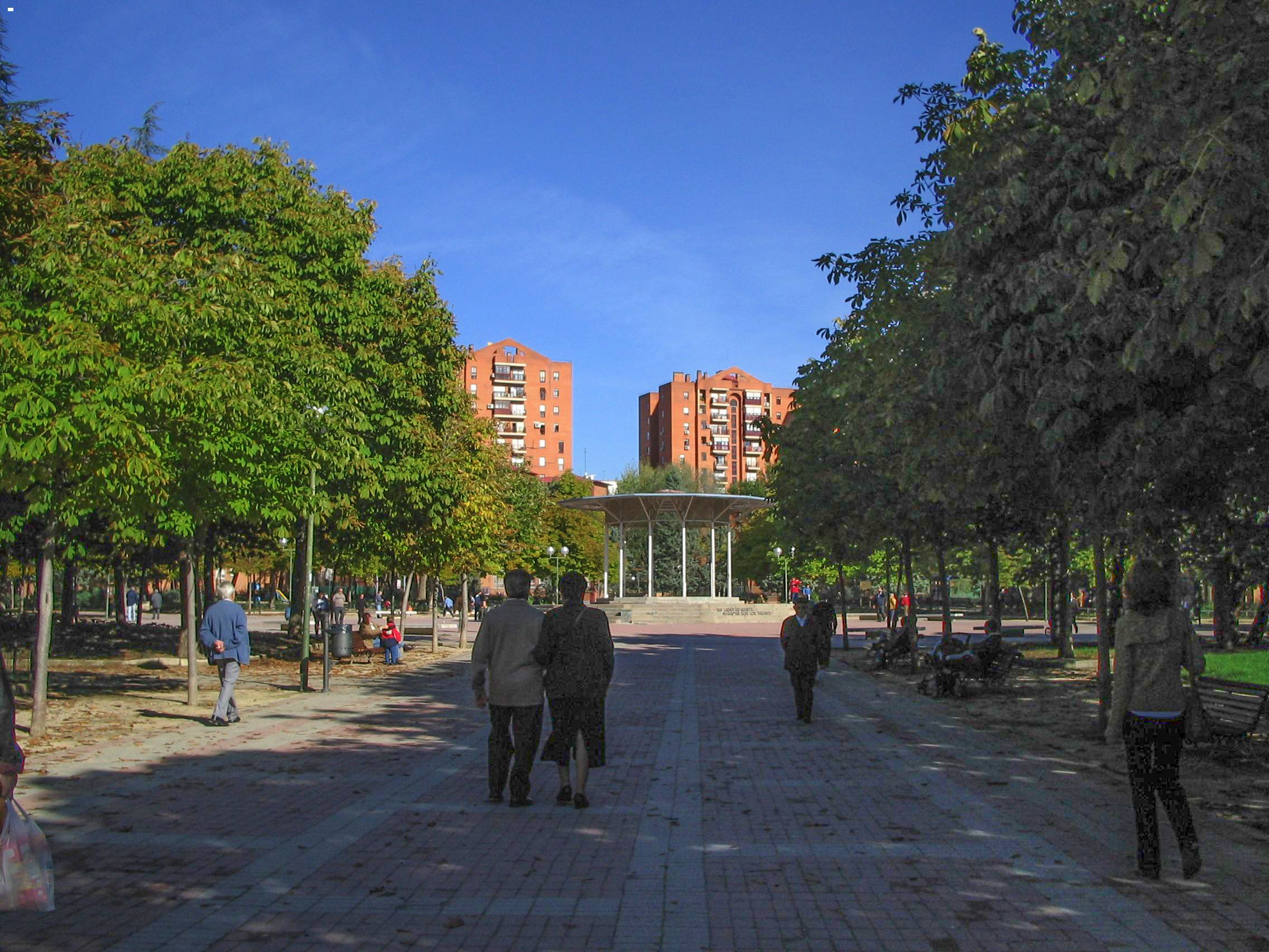 Paseo principal del parque de la Ciudad de los Ángeles